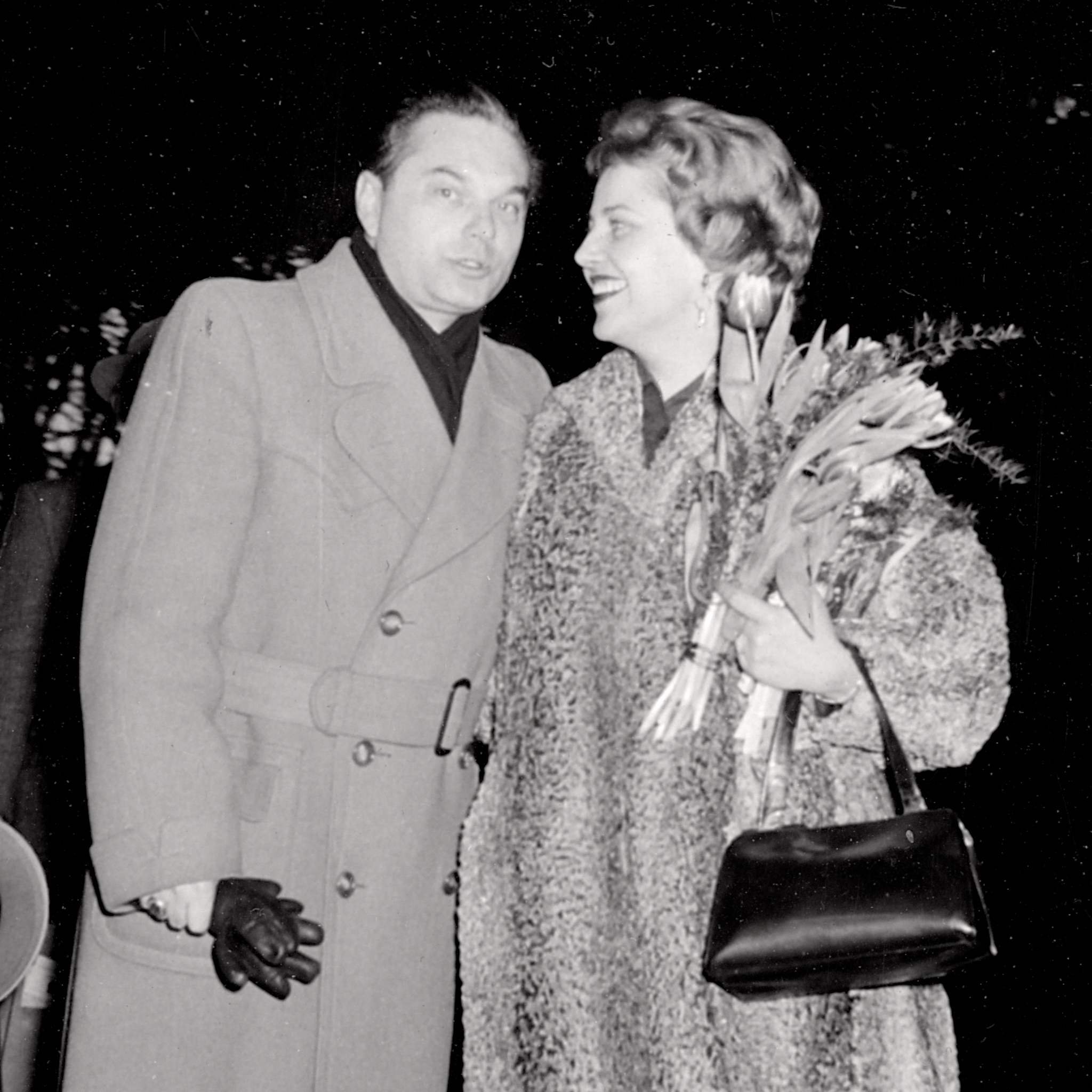 Ernst Matray und Lonny Kellner am Frankfurter Hauptbahnhof anlässlich einer Werbe-Tour für den Film "Musik, Musik und nur Musik" im Jahr 1955